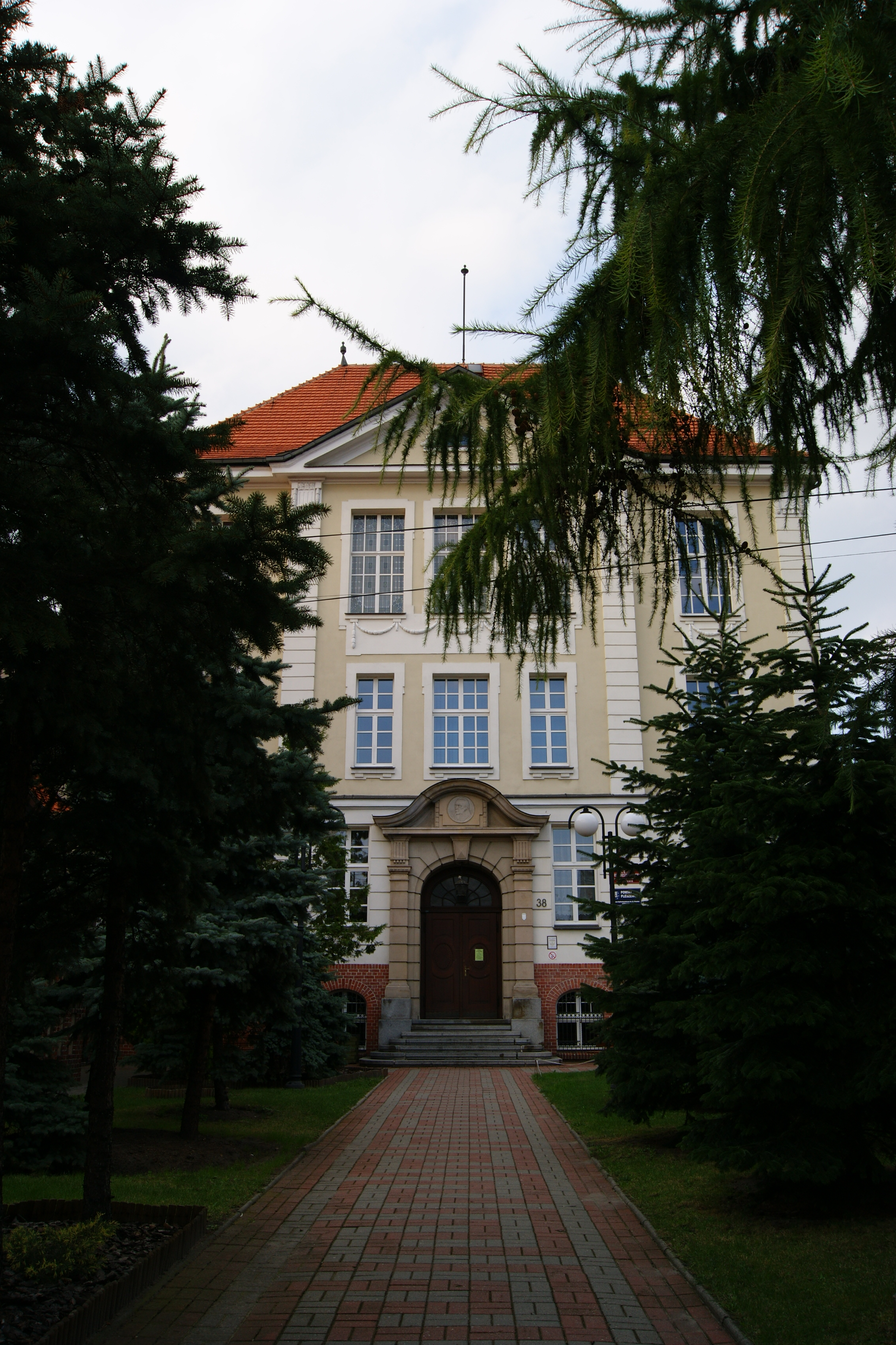 Pleszew, budynek Liceum Ogólnokształcącego z 1910 r., ul. Poznańska 38